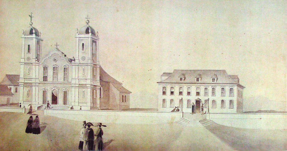 Herrmann Wendroth: Porto Alegre em 1852: Antiga Matriz com o primeiro palácio do governo ao lado. Aquarela.